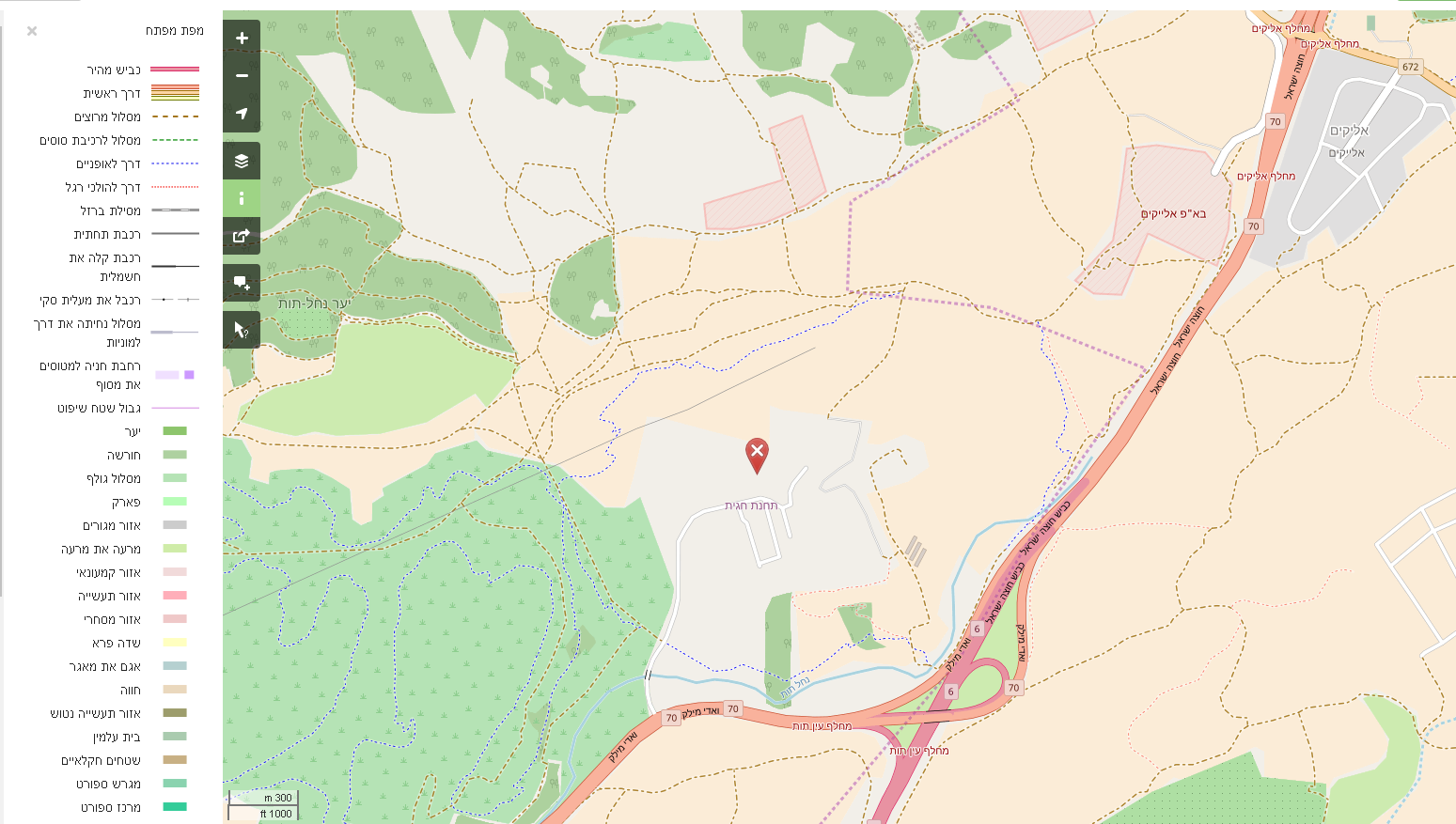 תחנת הכוח חגית וסביבתה עם מקרא